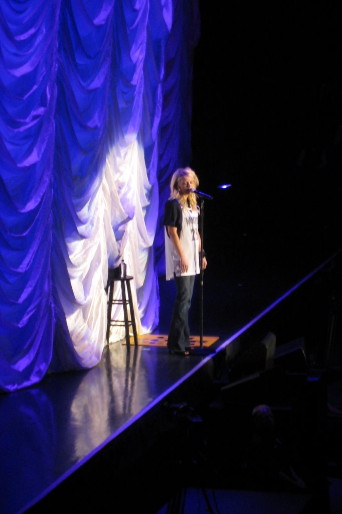 Melissa Peterman in 2008